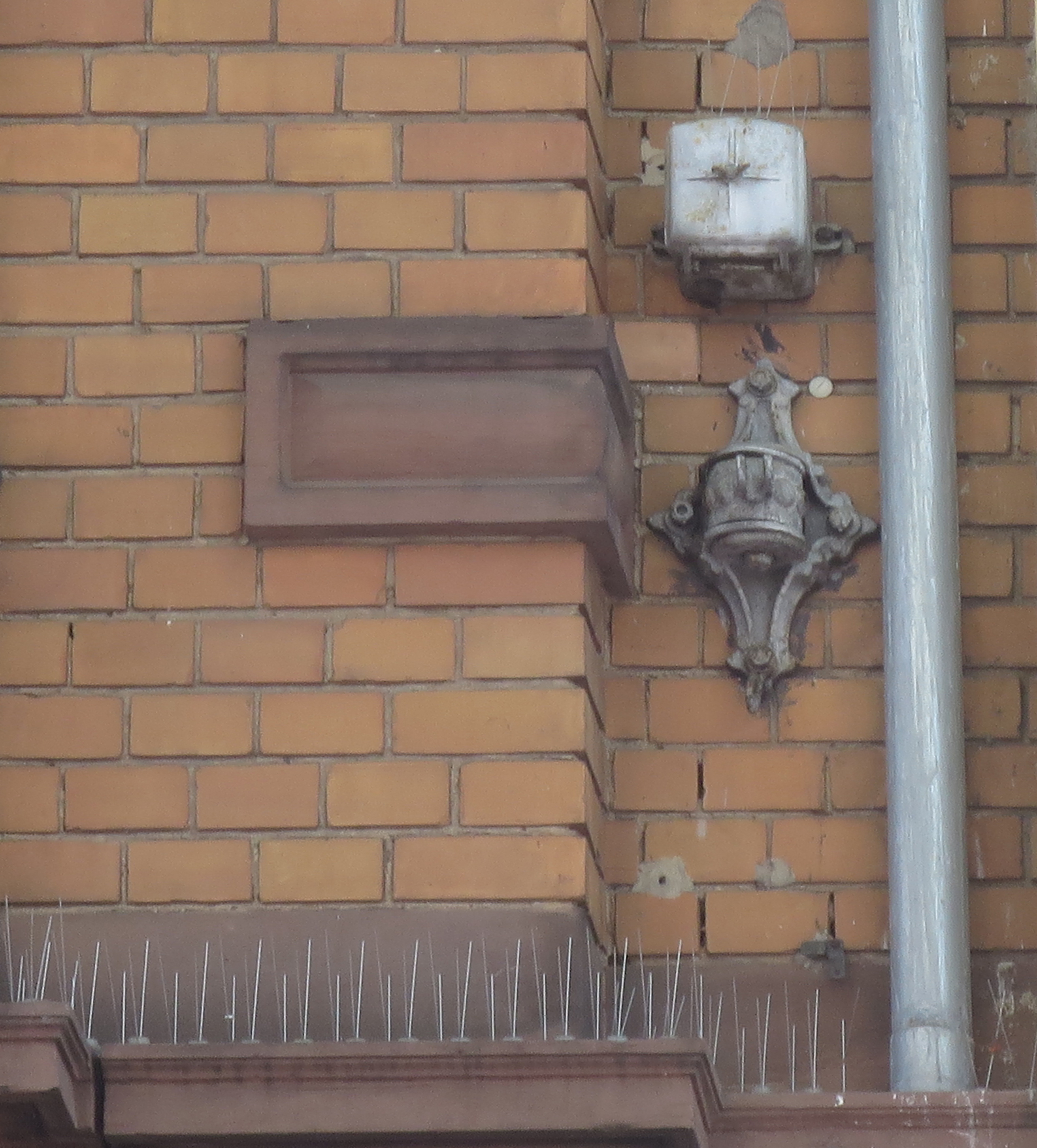 Oberleitungshalterung der Straßenbahn Worms. Wilhelm-Leuschner-Straße 24, Worms.